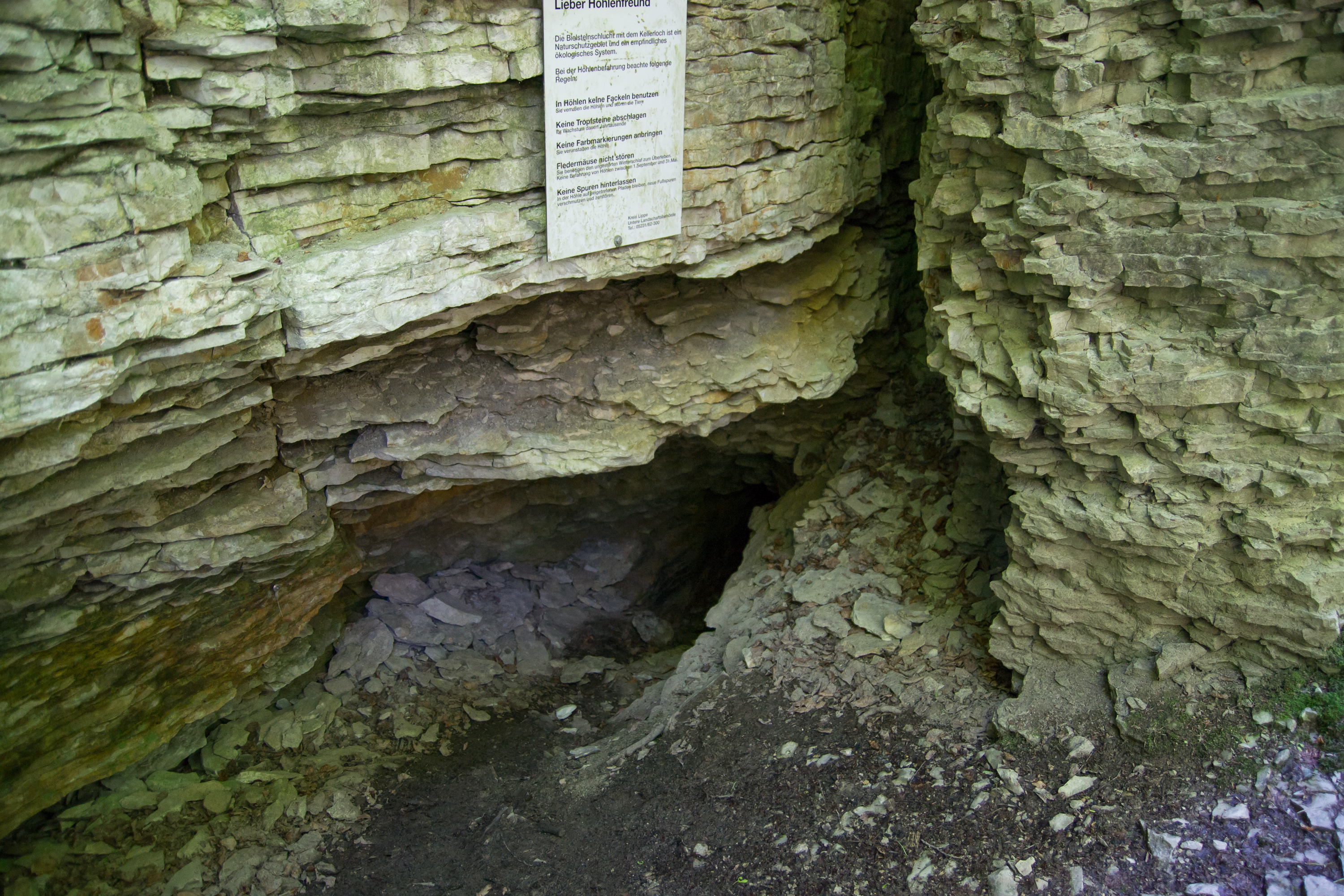 Bielsteinhöhle im Naturschutzgebiet "Bielsteinhöhle mit Lukenloch" bei Horn-Bad Meinberg